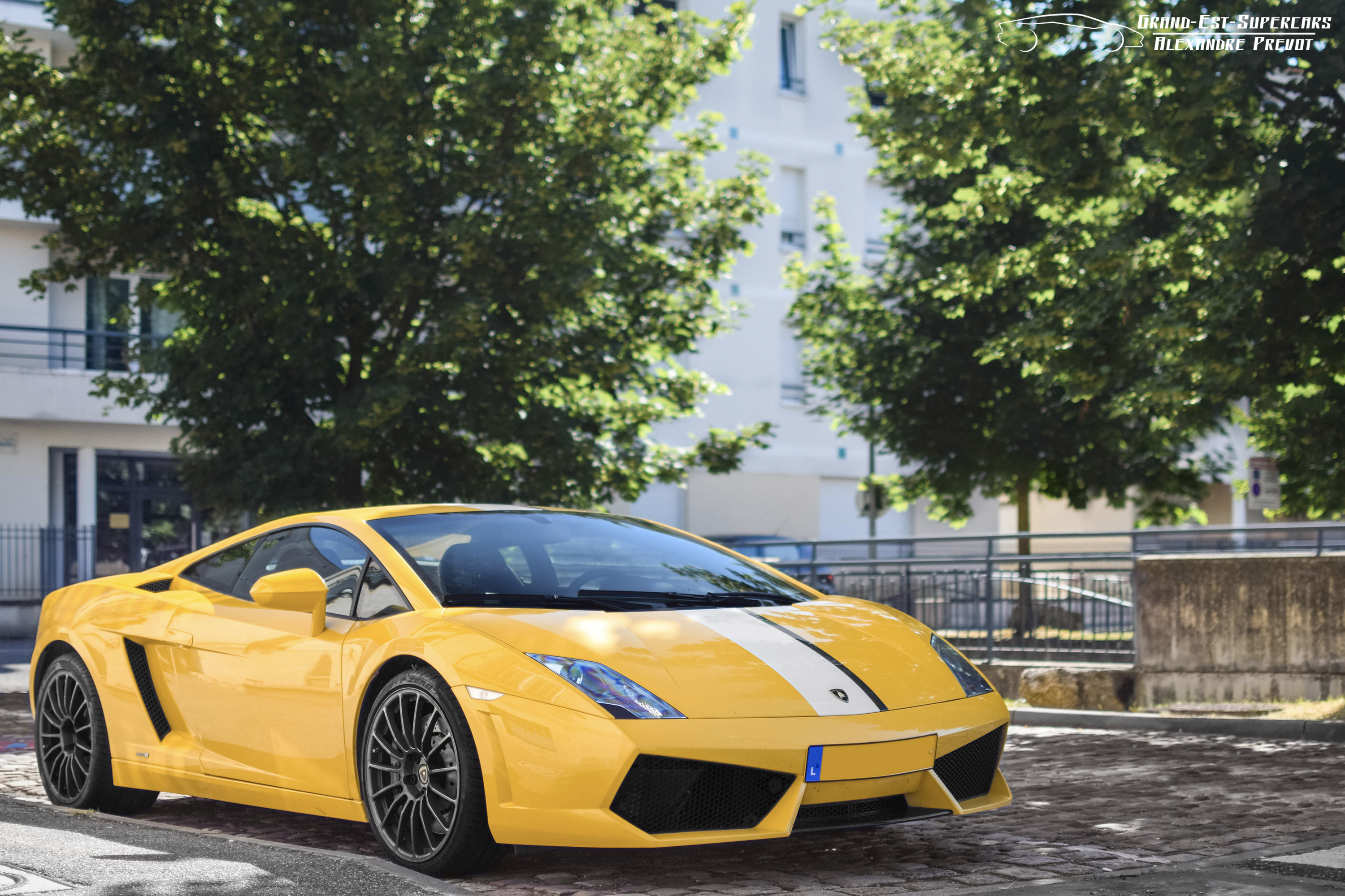 Année du modèle présenté : 2010 Production : 250 exemplaires Couleur : Giallo Midas